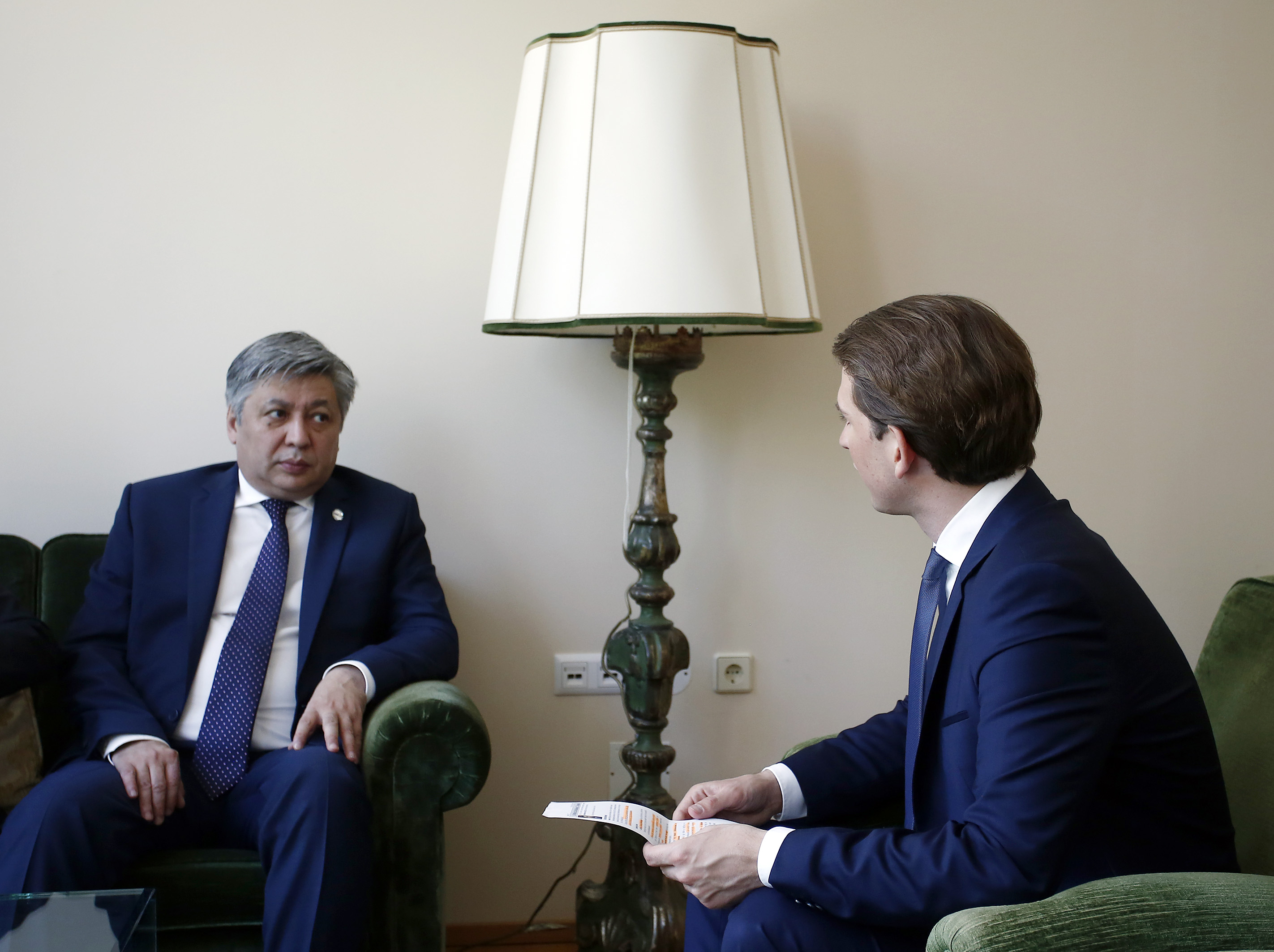 OSCE Konferenz Mauerbach. 11.07.2017, Foto: Dragan Tatic